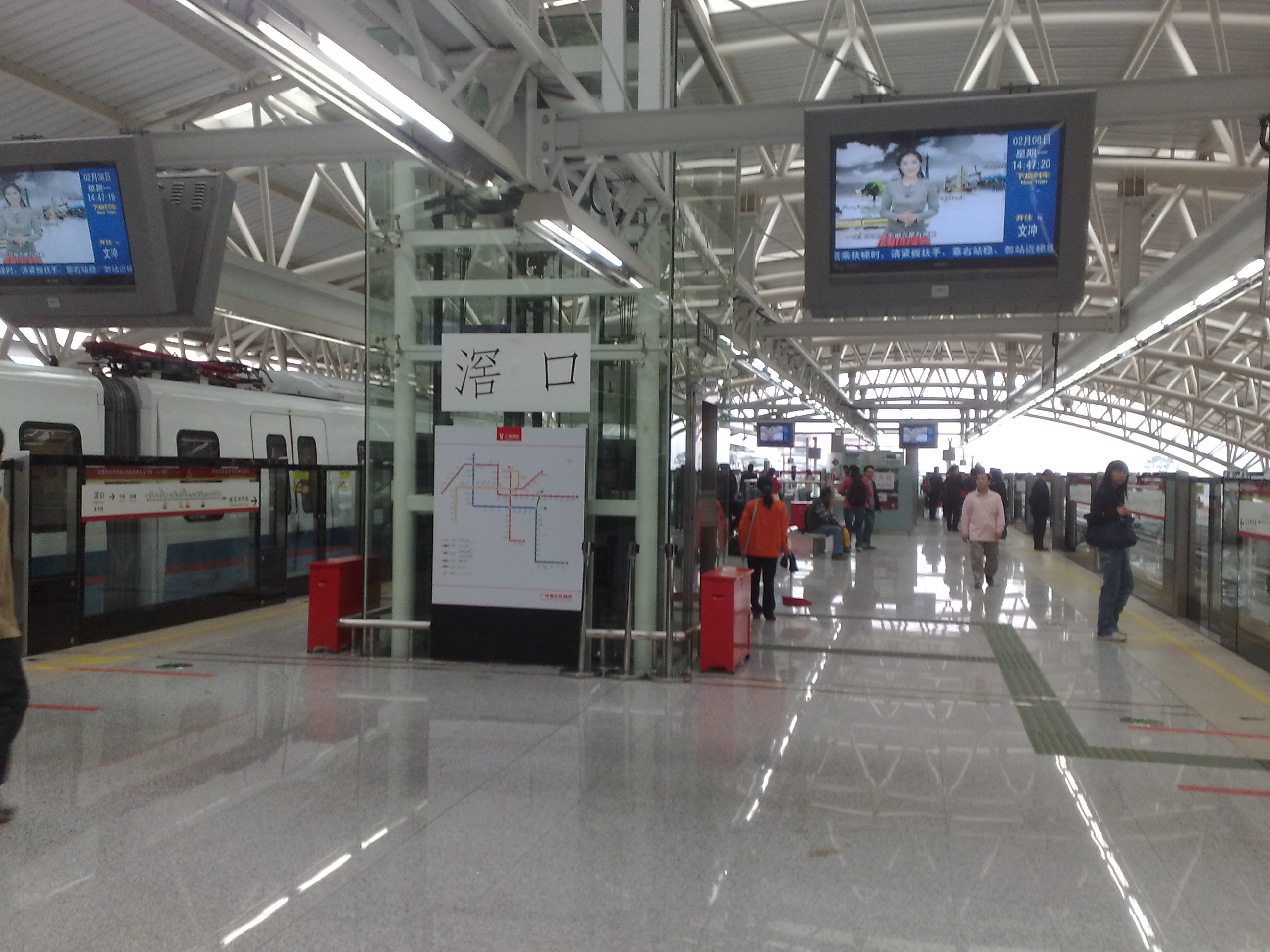 廣州地鐵滘口站站台